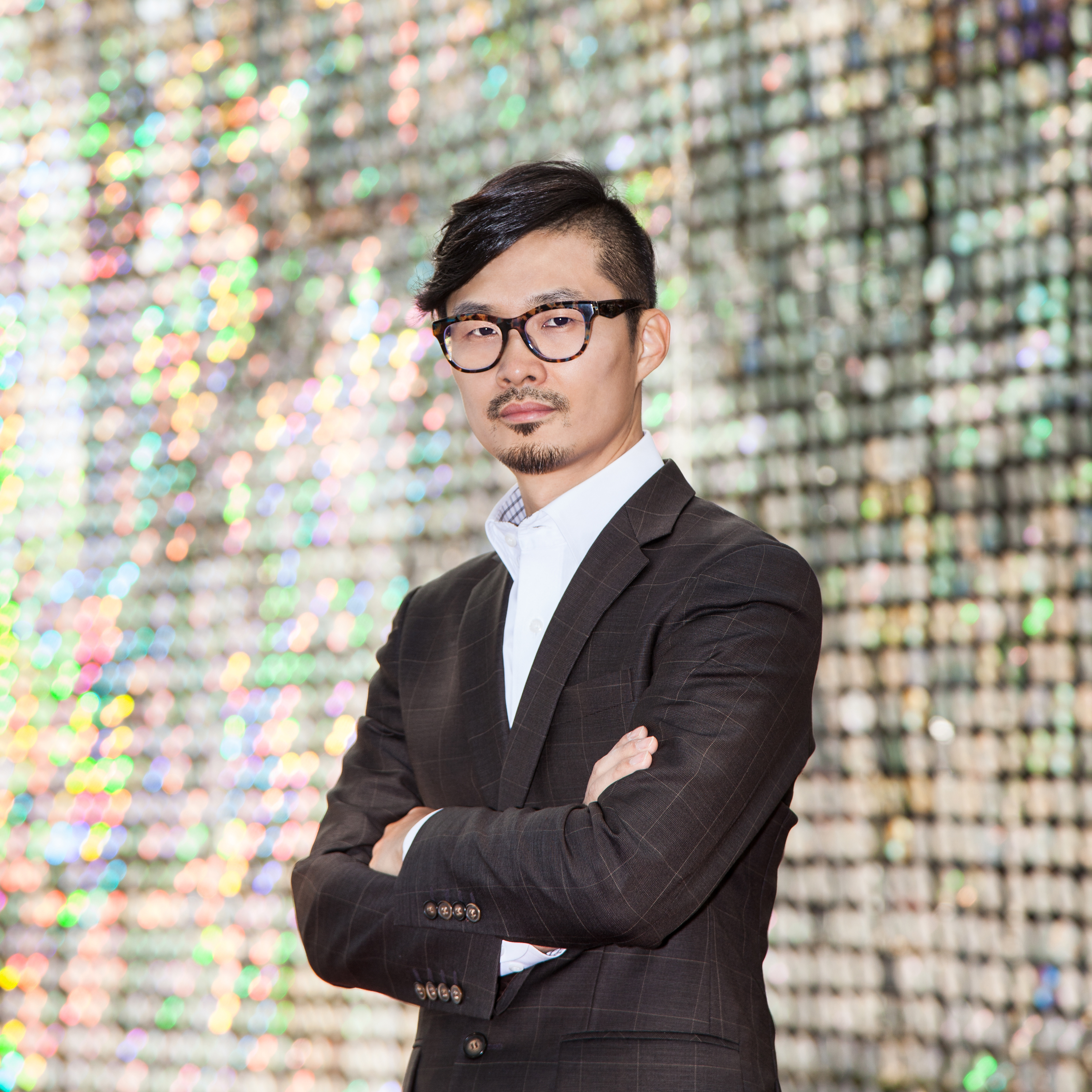 Byeong Sam Jeon (Artist)